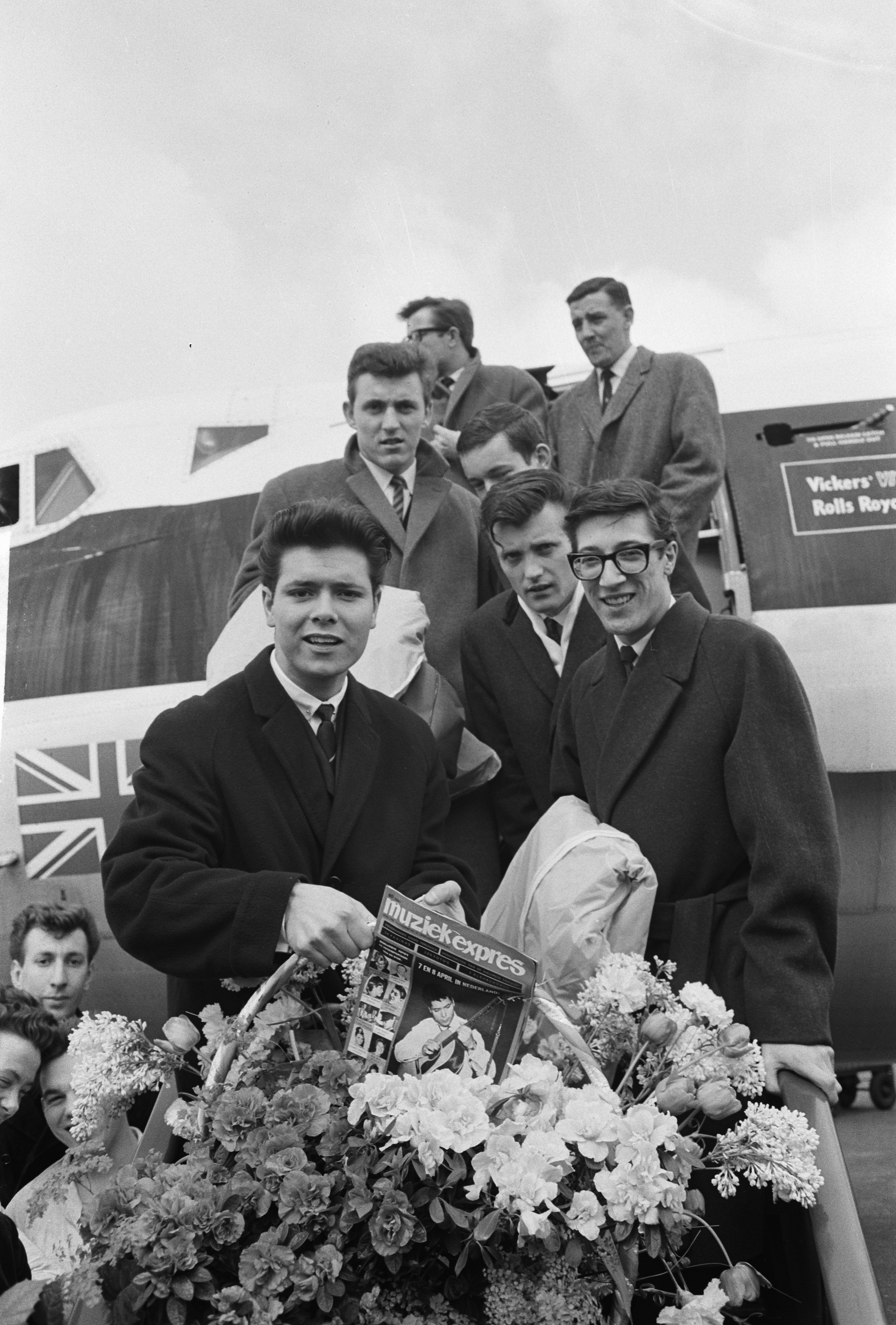 Collectie / Archief : Fotocollectie Anefo Reportage / Serie : [ onbekend ] Beschrijving : Cliff Richard aankomst met zijn Shadows Datum : 6 april 1962 Locatie : Noord-Holland, Schiphol Trefwoorden : artiesten, groepen, muziek, zangers Persoonsnaam : Richard, Cliff Instellingsnaam : Shadows, The Fotograaf : Pot, Harry / Anefo Auteursrechthebbende : Nationaal Archief Materiaalsoort : Negatief (zwart/wit) Nummer archiefinventaris : bekijk toegang 2.24.01.05 Bestanddeelnummer : 913-7395